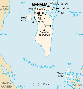 Karte von Bahrain